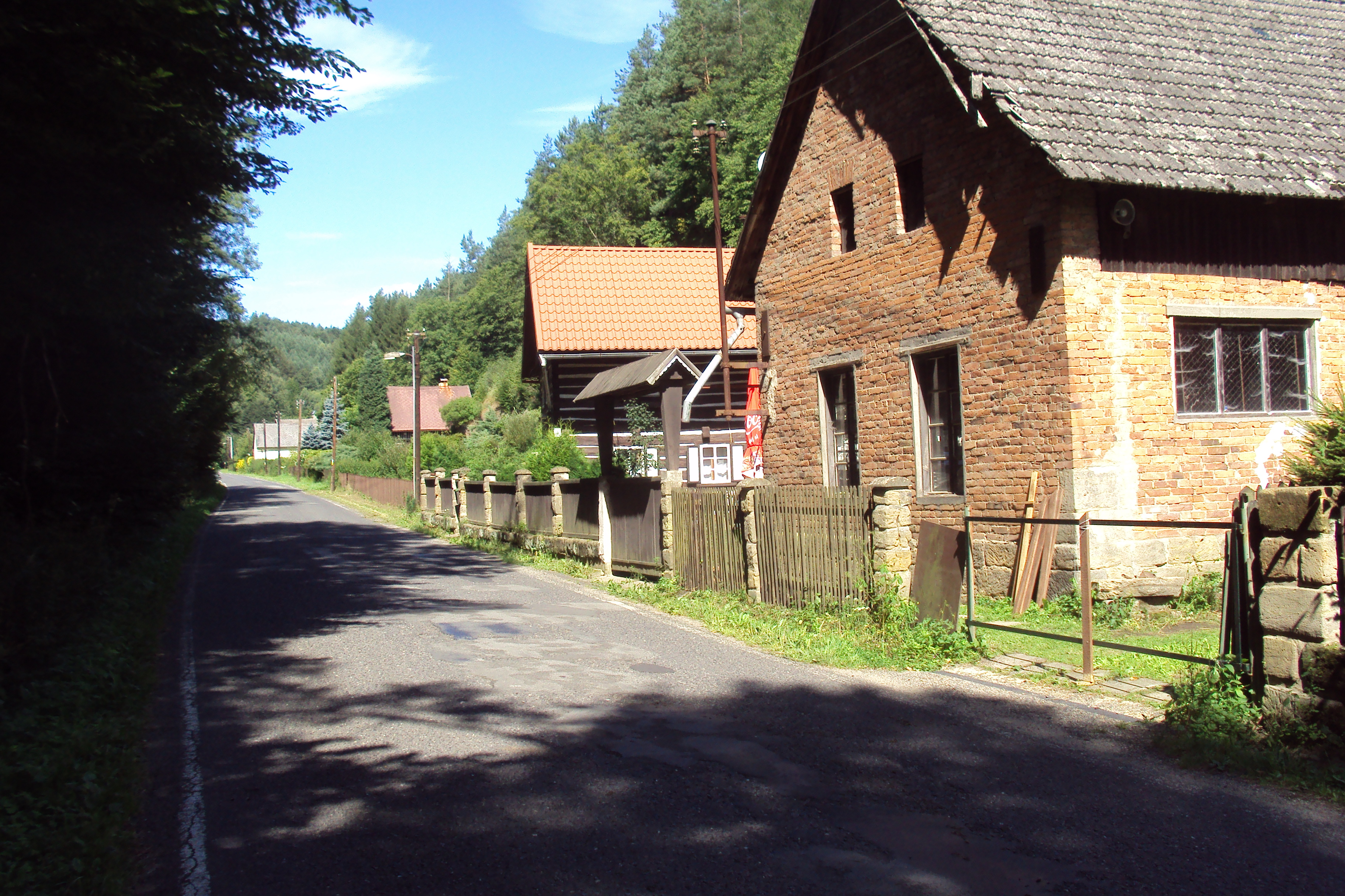 Blatečky jsou pod obcí Blatce, při silnici do Dubé na Kokořínsku